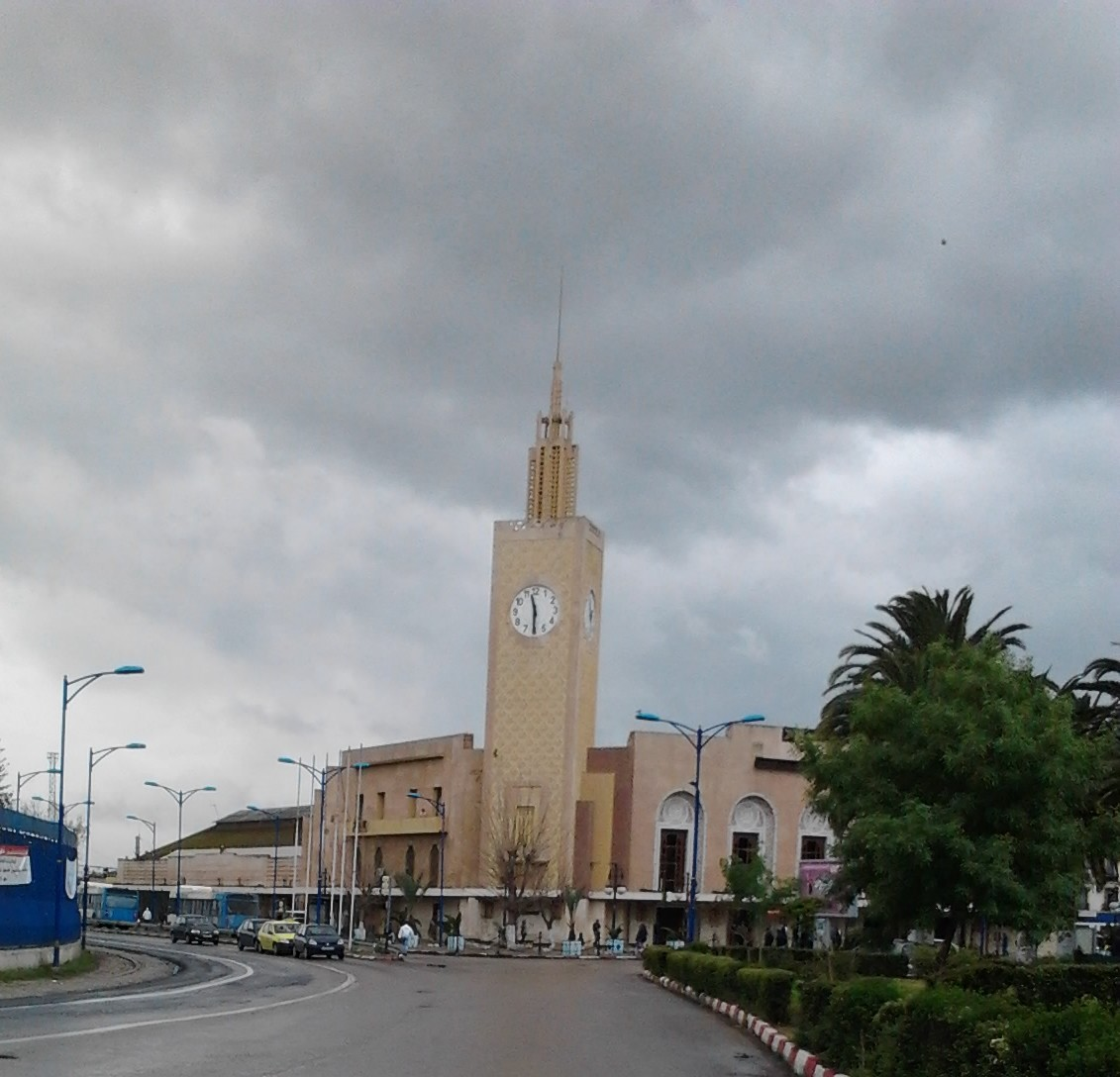 Gare d'Annaba